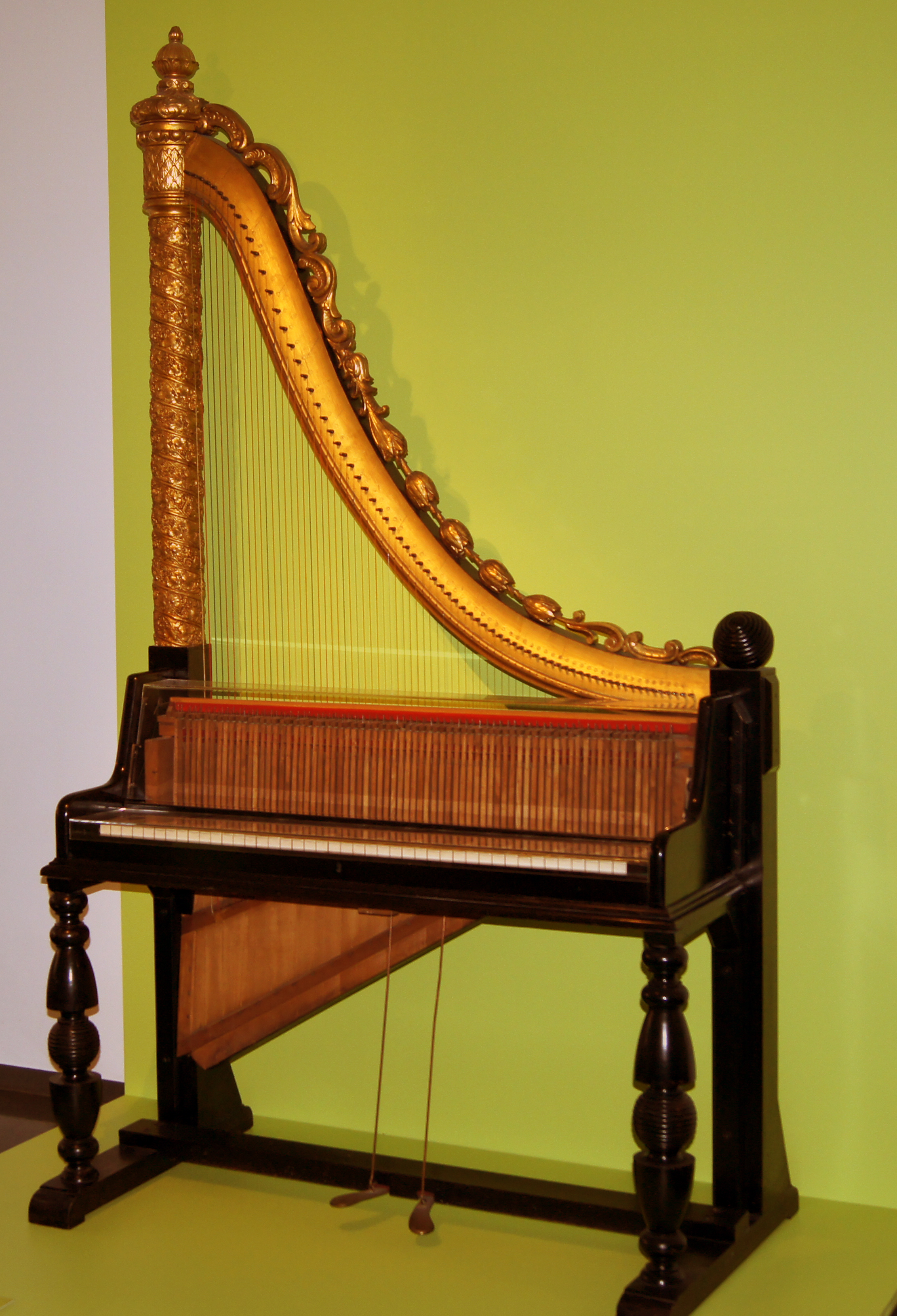 Klavierharfe, Ignaz Lutz (?), Wien, um 1891; Exponat im Haus der Musik (Fruchtkasten), Landesmuseum Württemberg, Stuttgart